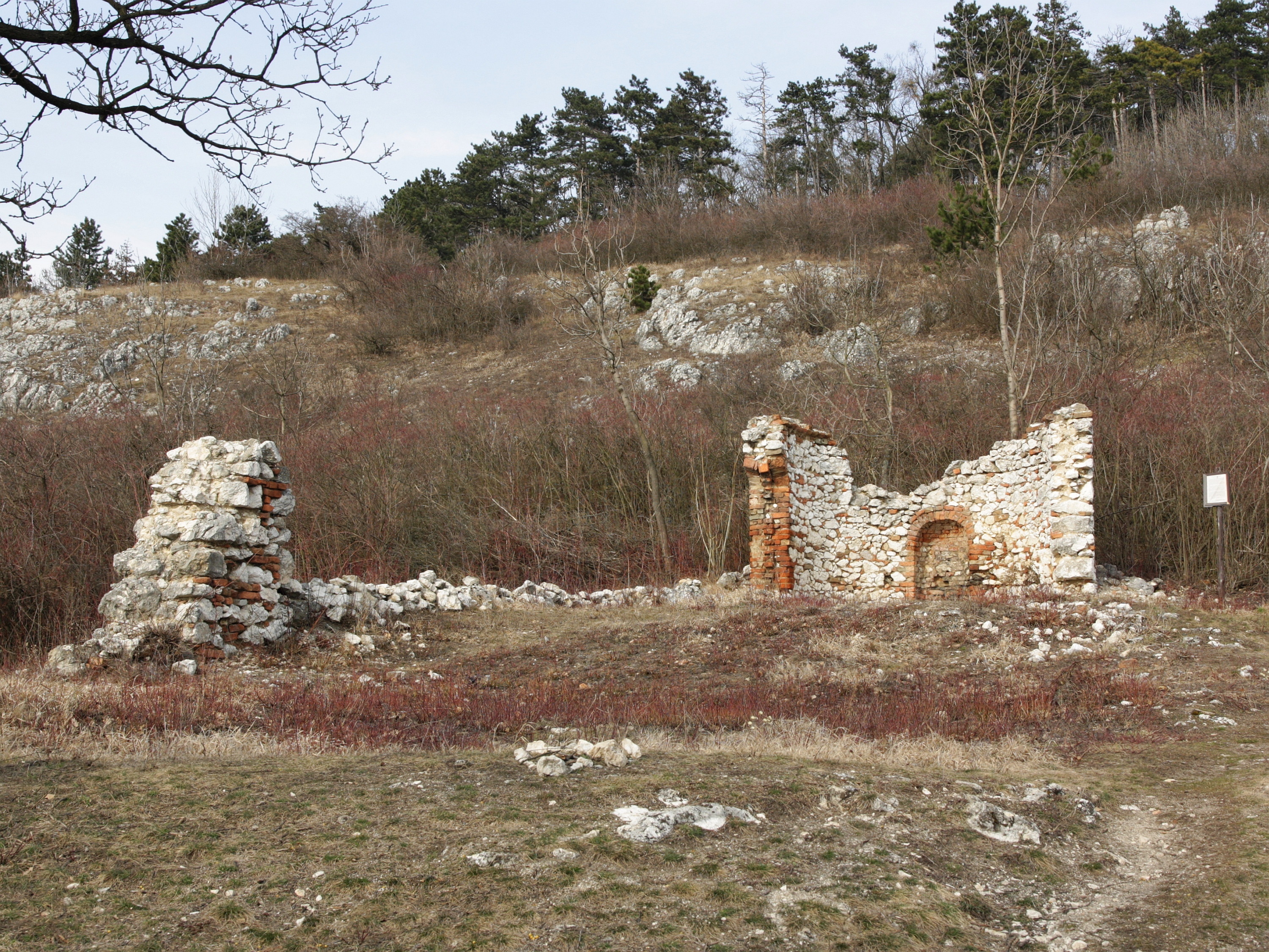 Perná - zřícenina kaple svatého Antonína.